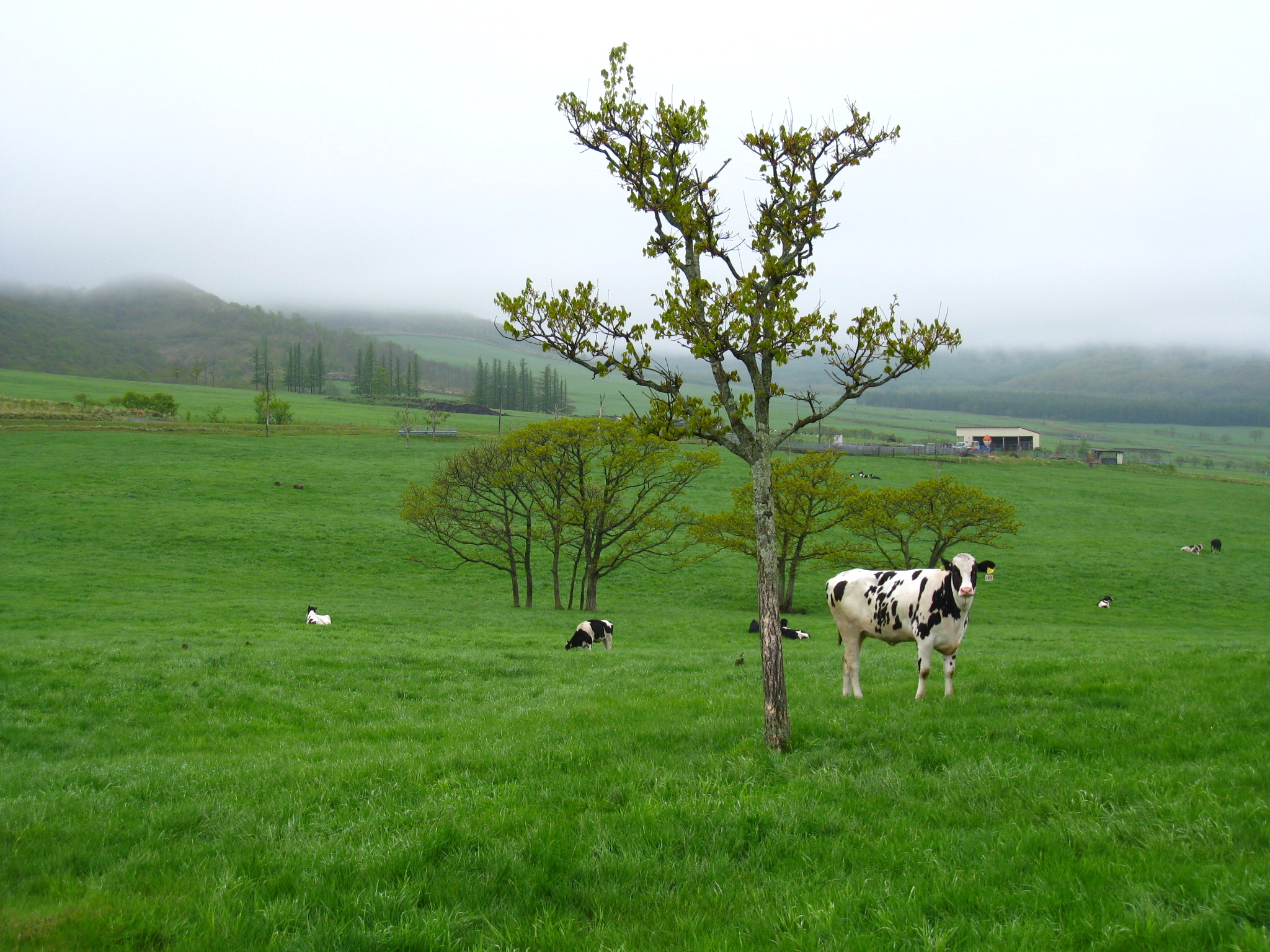 放牧（Pasturage）